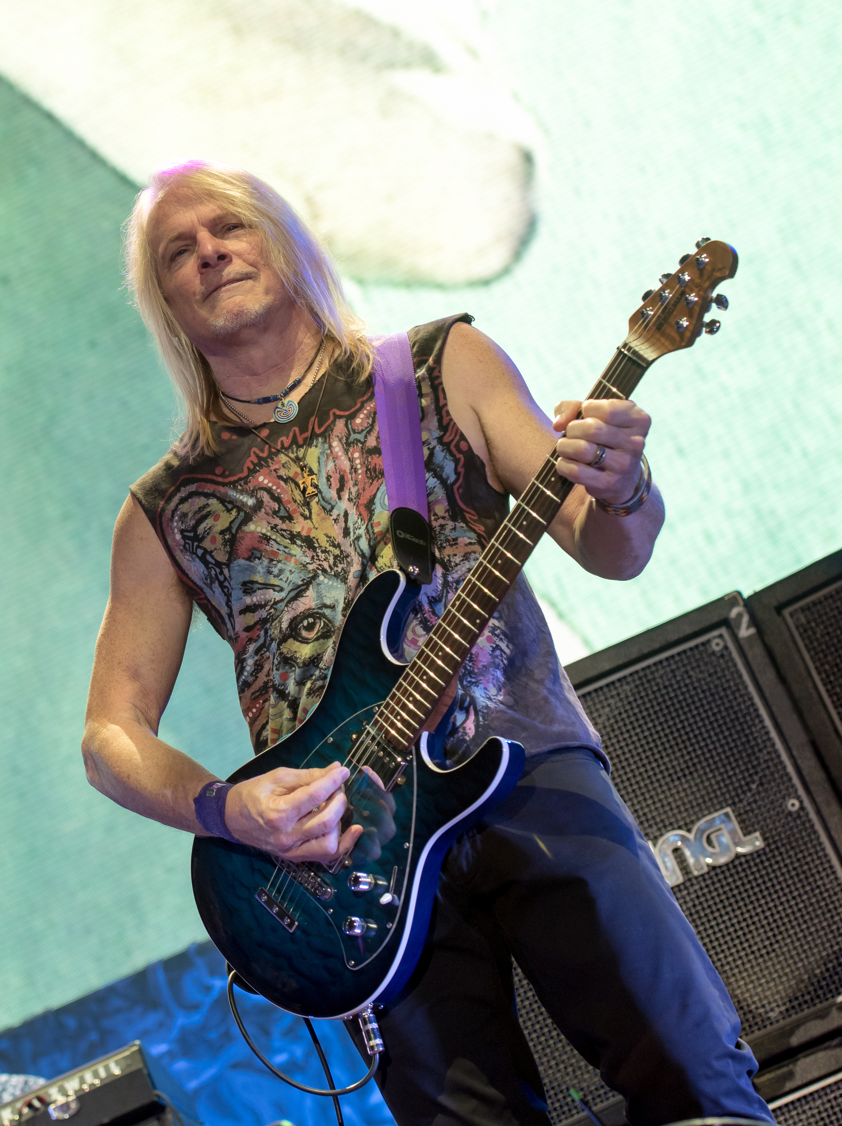 Steve Morse von Deep Purple bei der inFinite "The Long Goodbye Tour" in der Barclaycard Arena in Hamburg 2017